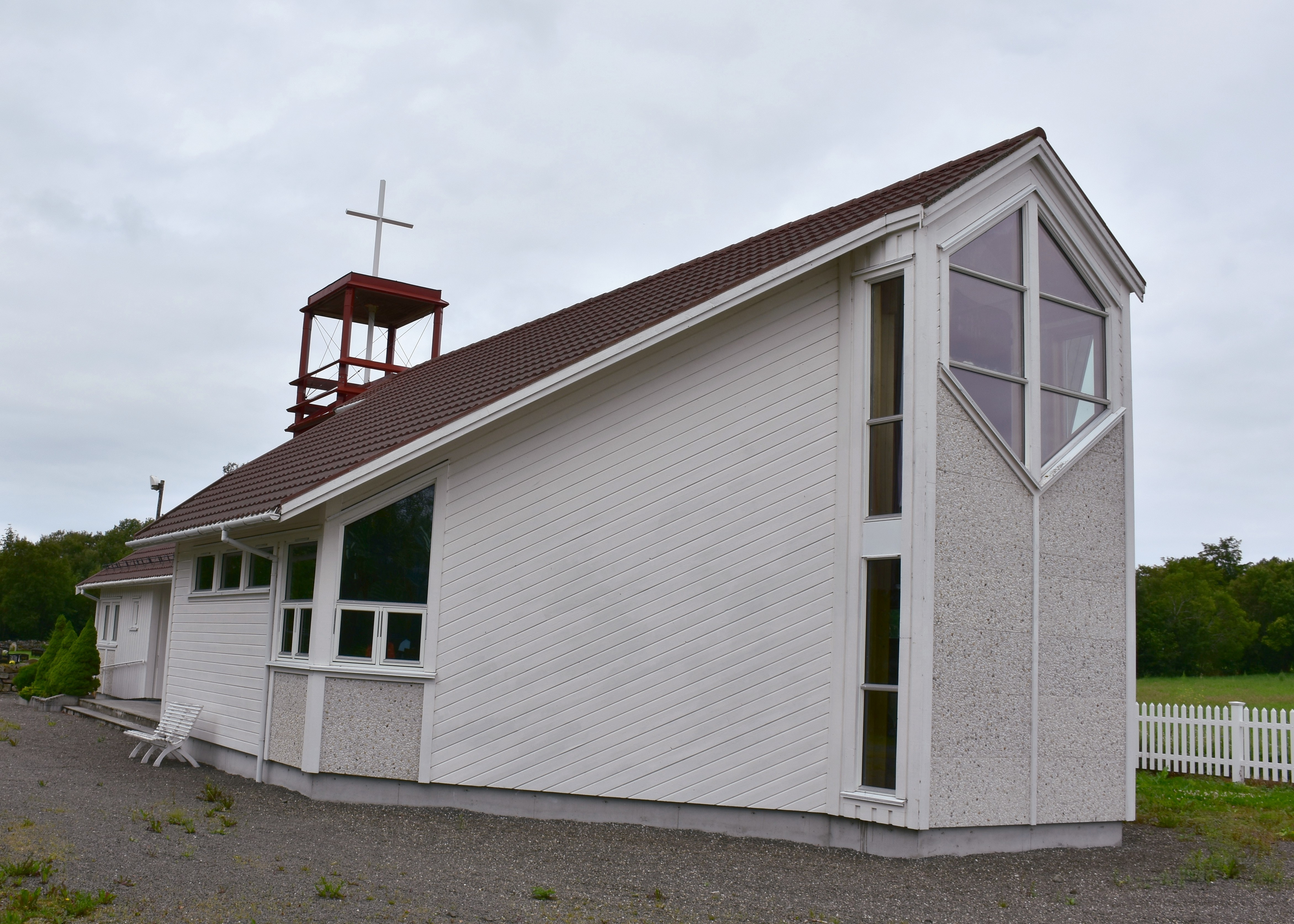 Gaustad kapell